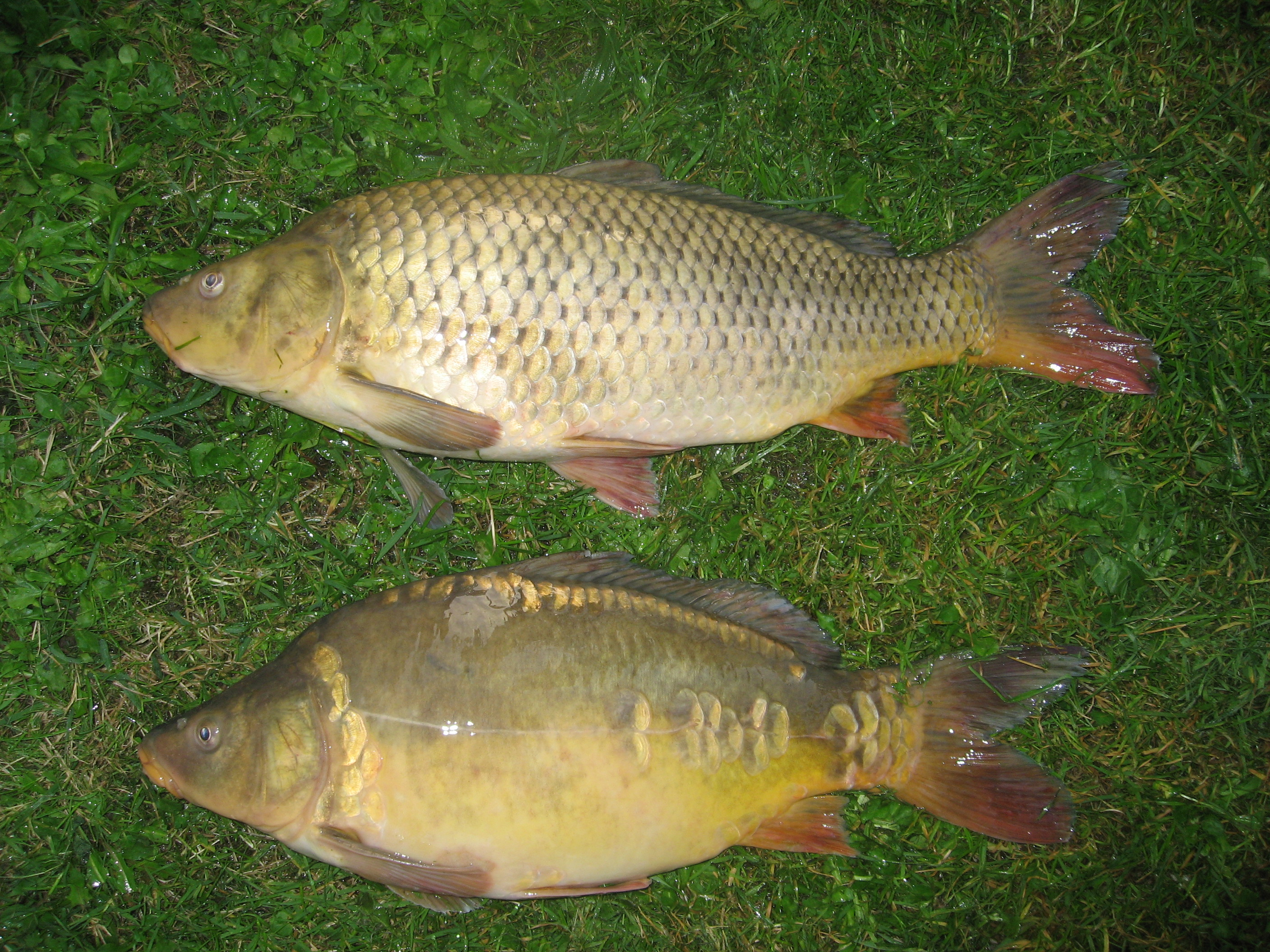 Kapr obecný